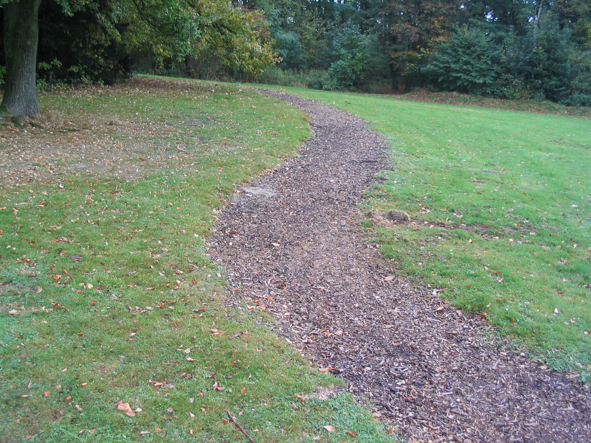 "Finnenbahn" Running-track in Witten, Northrine-Westfalia, Germany